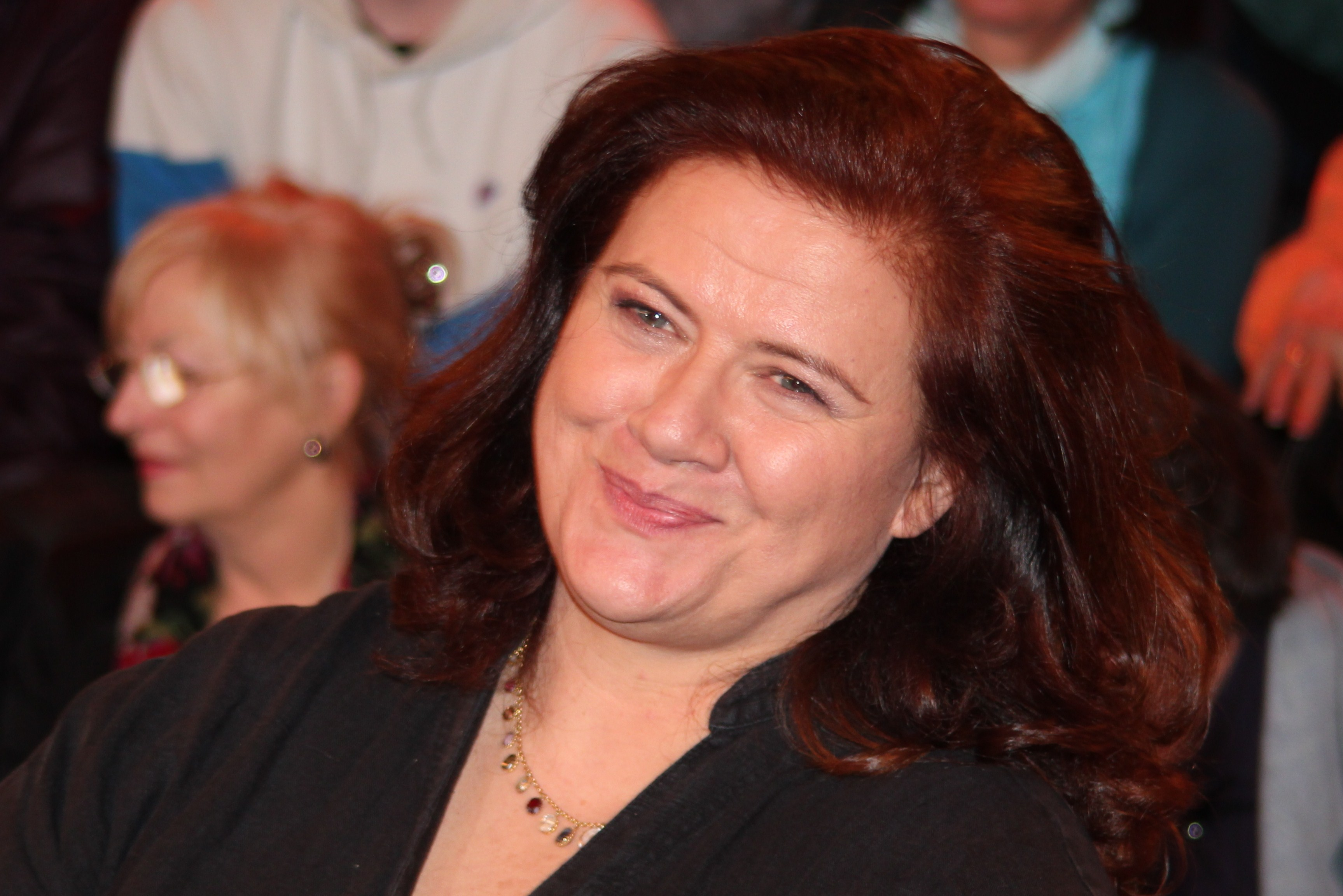 Jutta Ditfurth (Geburtsname Jutta Gerta Armgard von Ditfurth; * 29. September 1951 in Würzburg) ist eine deutsche Sozialwissenschaftlerin, Publizistin und Politikerin.